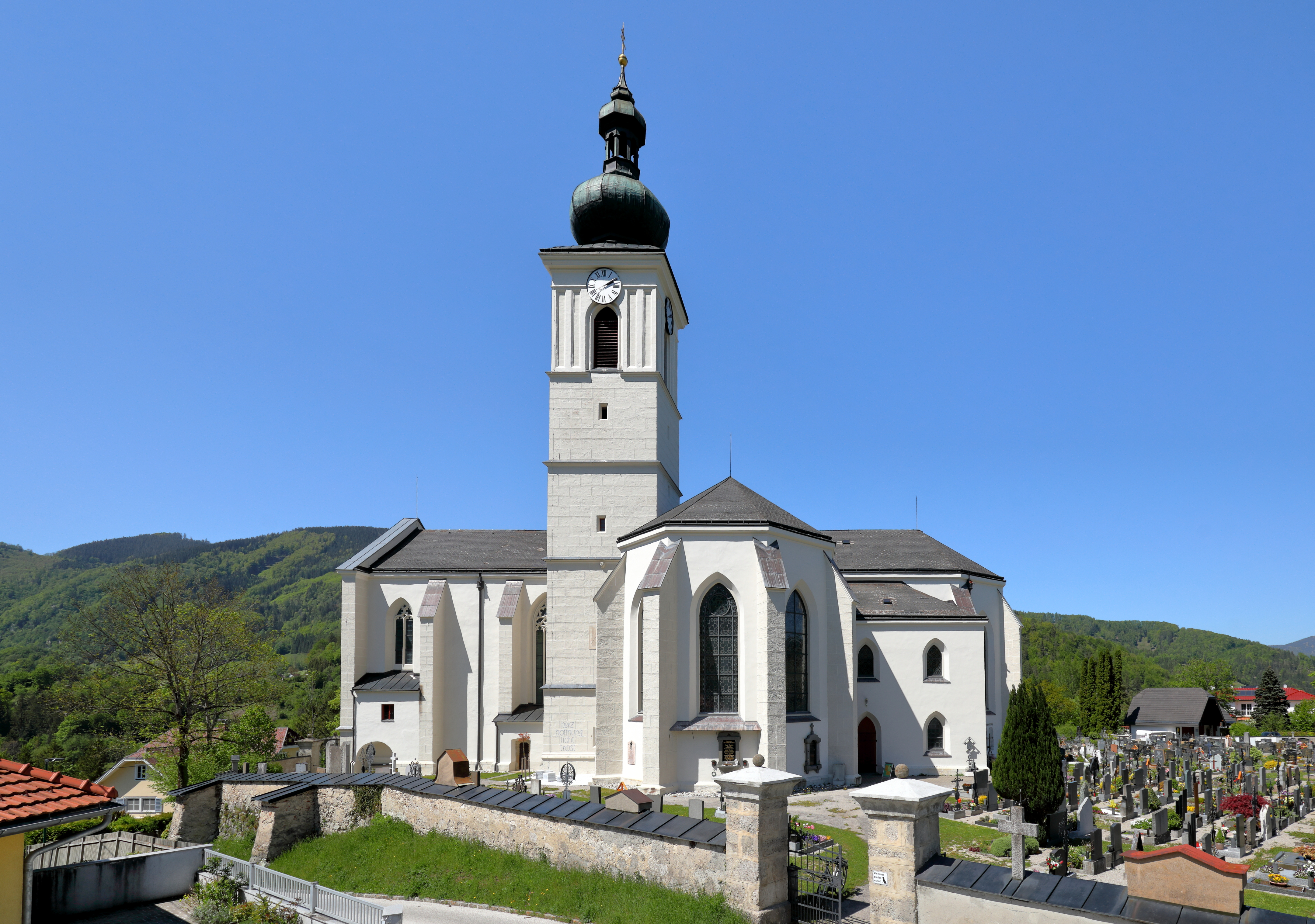 Südostansicht der röm.-kath. Pfarrkirche hl. Johannes der Evangelist in der oberösterreichischen Marktgemeinde Weyer.